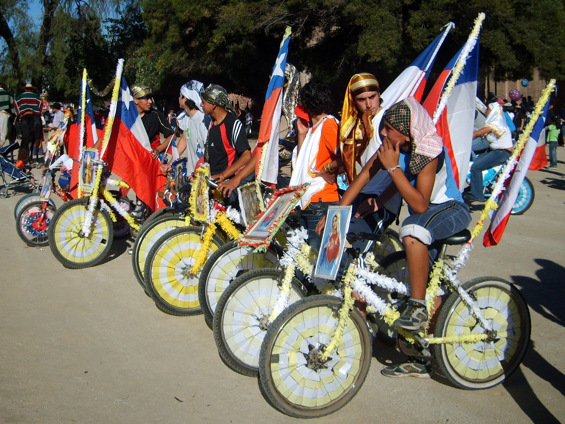 Ciclistas participantes del Cuasimodo, en el Templo Votivo de Maipú, Santiago de Chile, 30 de marzo de 2008.